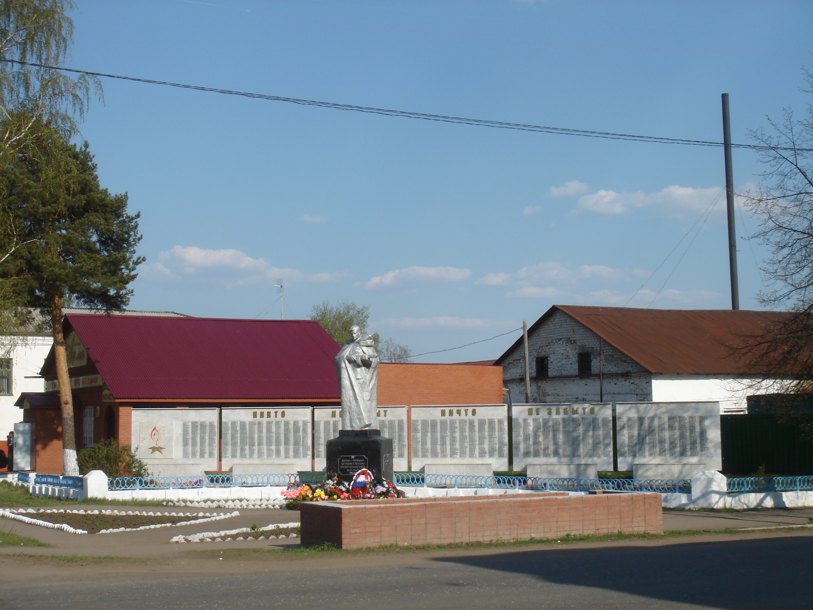 Воинам города Камбарки погибшим в Великой Отечественной войне 1941-1945